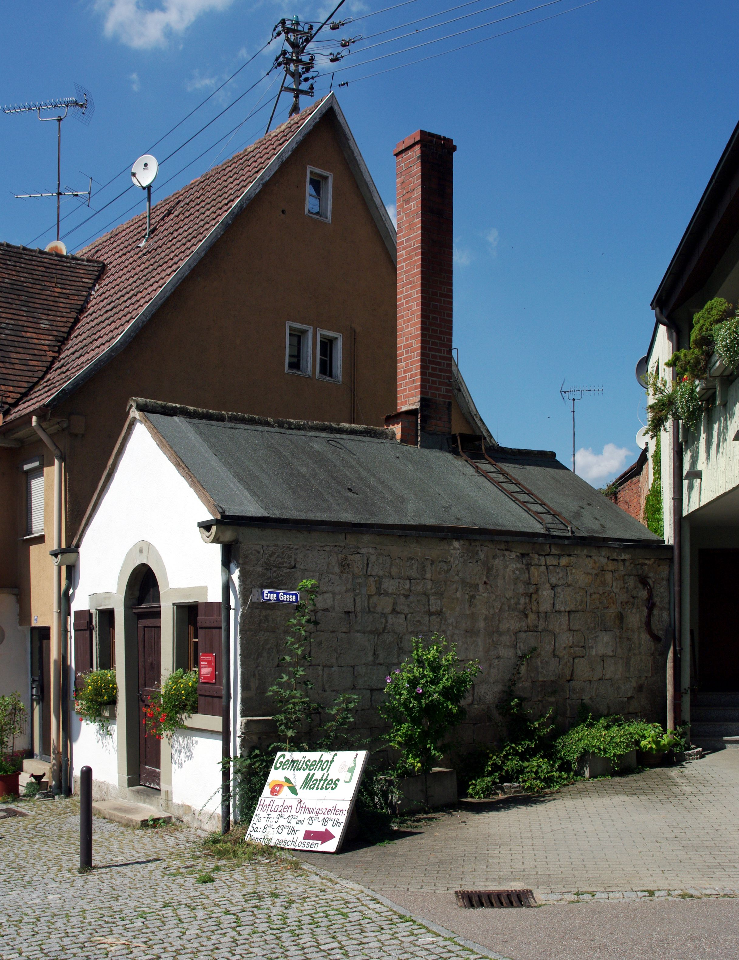 Das 1836 gebaute und mit zwei Öfen und einer Obstdarre ausgestattete Backhaus in Unterriexingen.